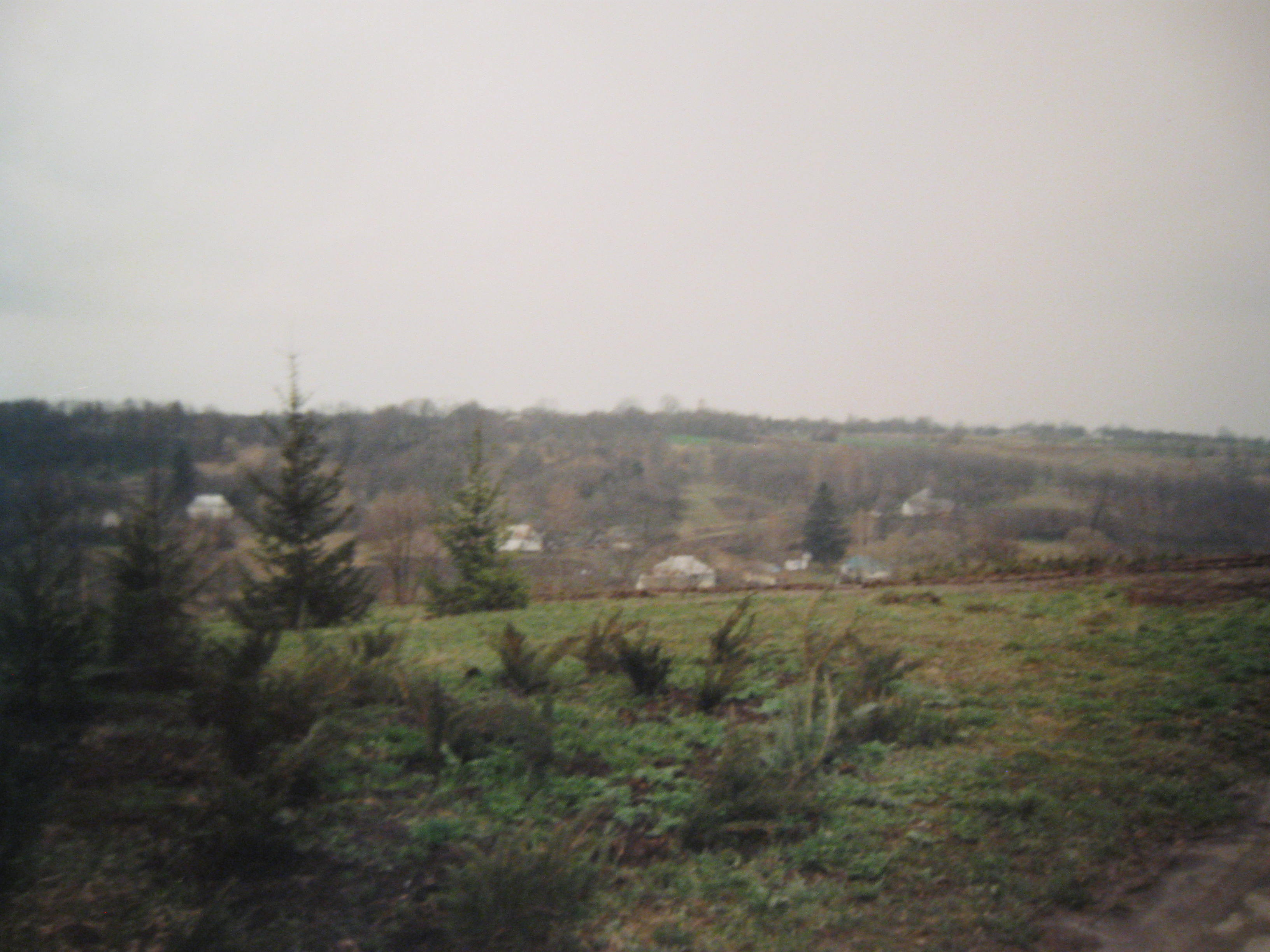 Ландшафт і вид на село Моринці, Звенигородський район.